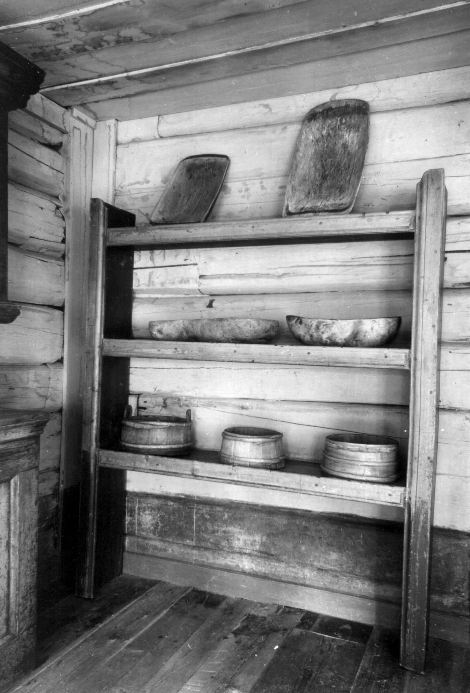 Melkehylle fra Kongsvinger i Hedmark. Fotografert av Gisle Midttun / Norsk Folkemuseum i 1938.